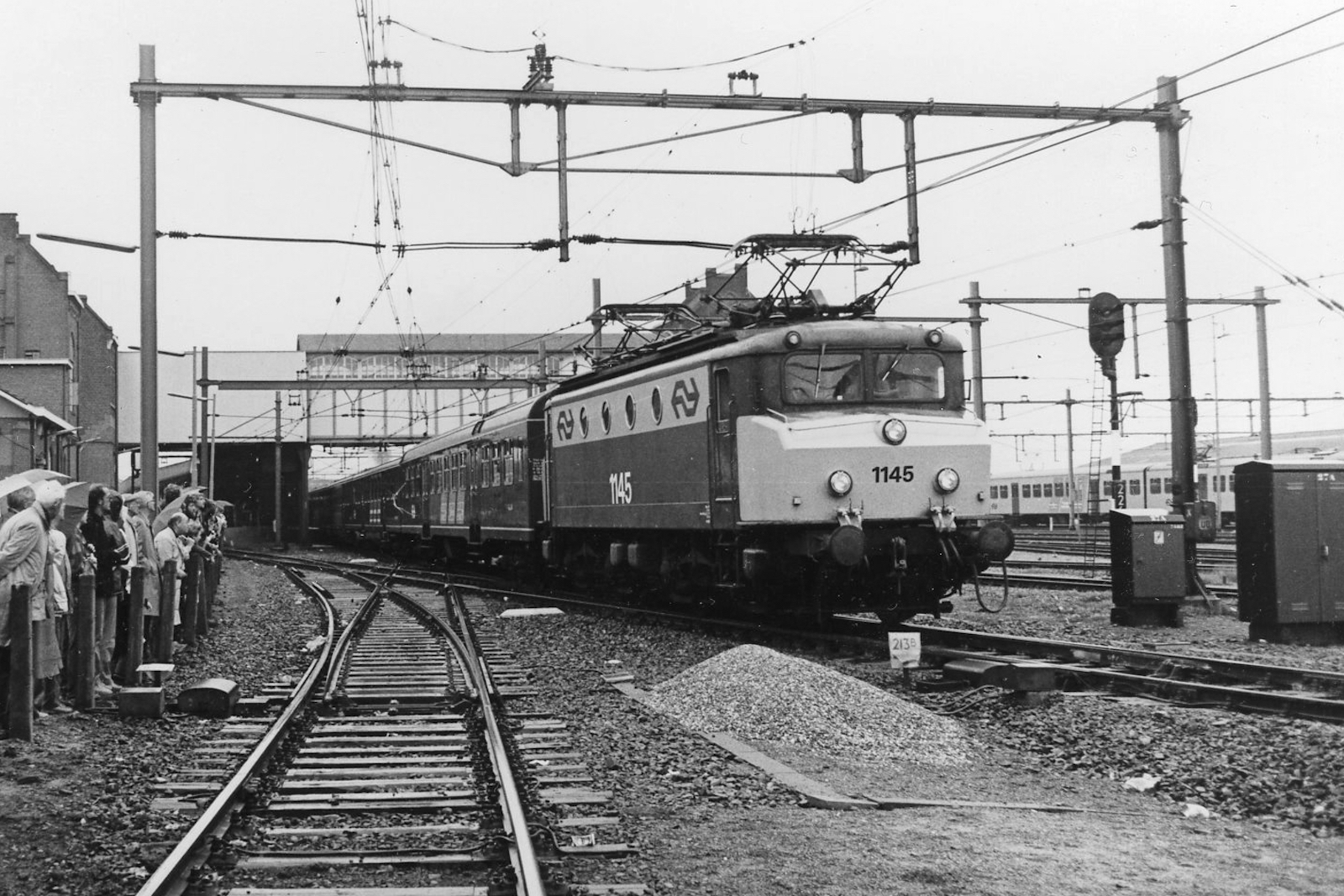 NS loc 1145 te Amersfoort